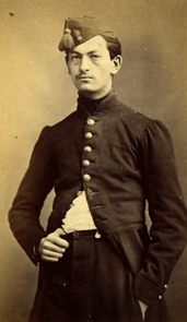 French geologist Auguste Michel-Lévy (1844-1911)